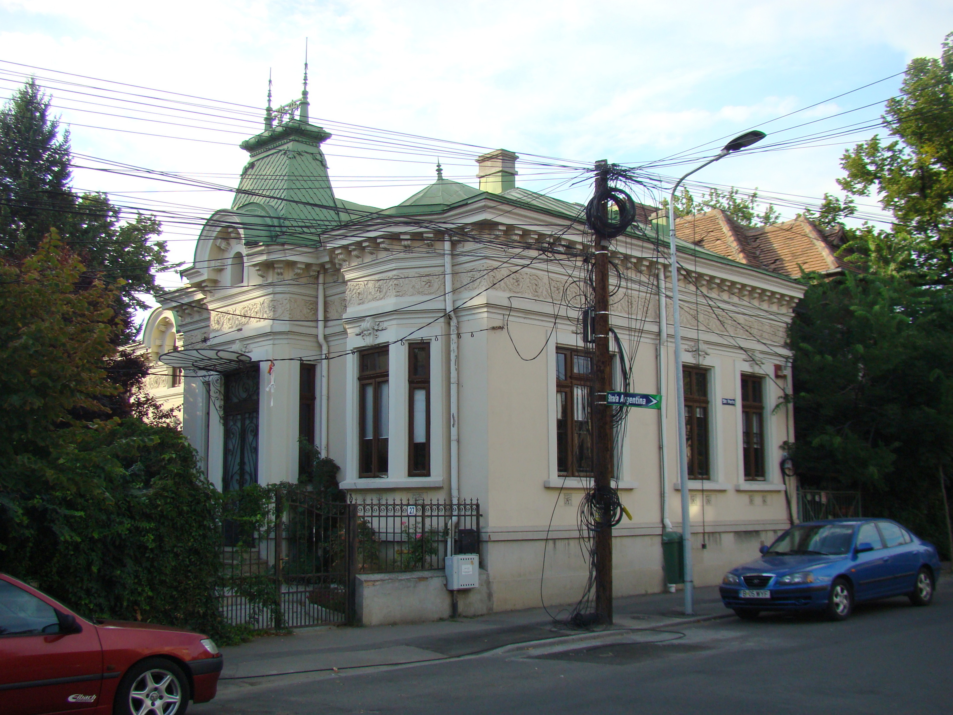 Clădire monument istoric, str. Paris, nr 27